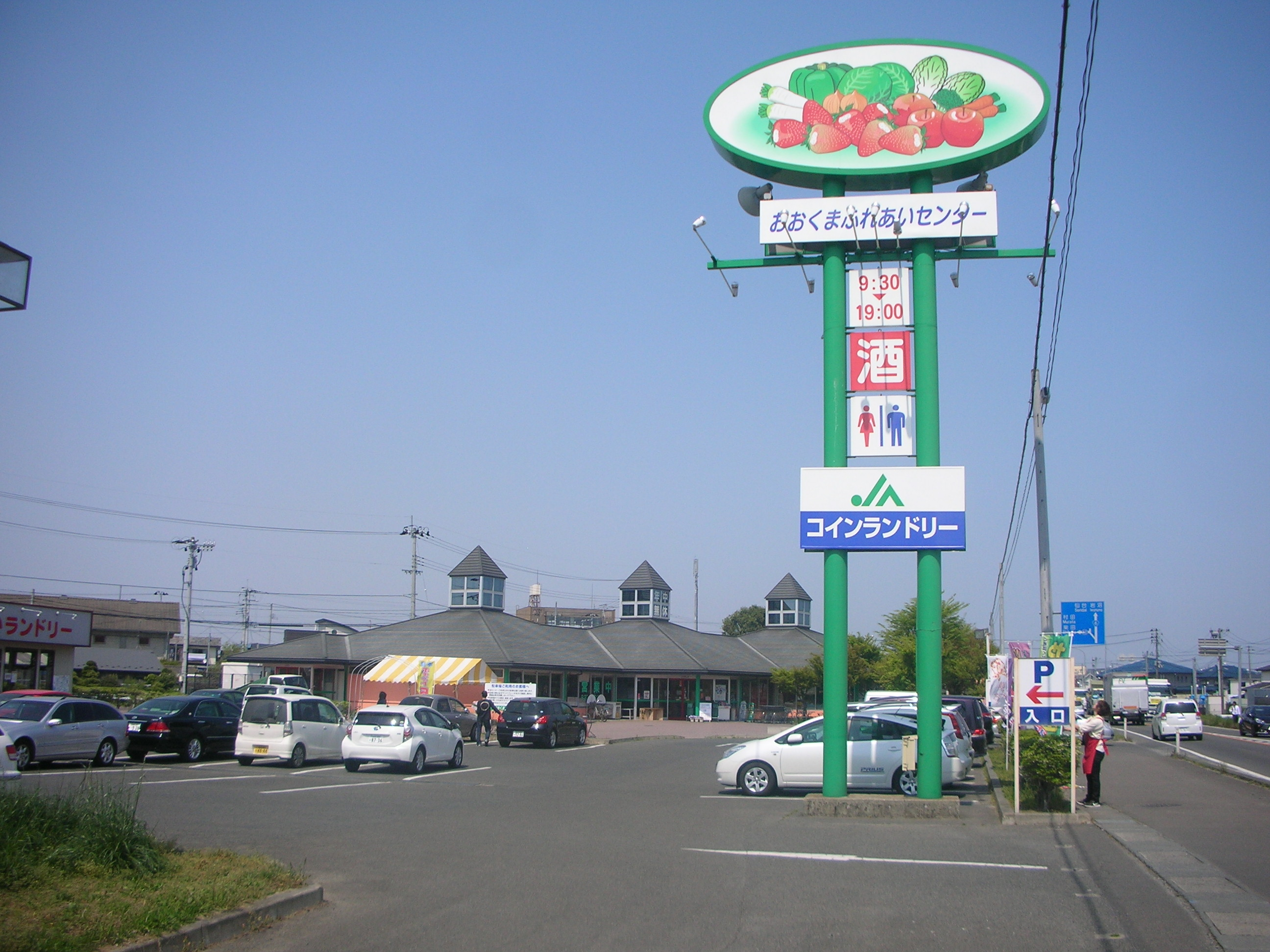 逢隈ふれあいセンター